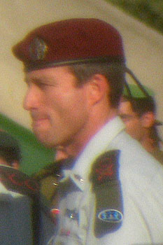 IDF Aluf Elazar Shteren